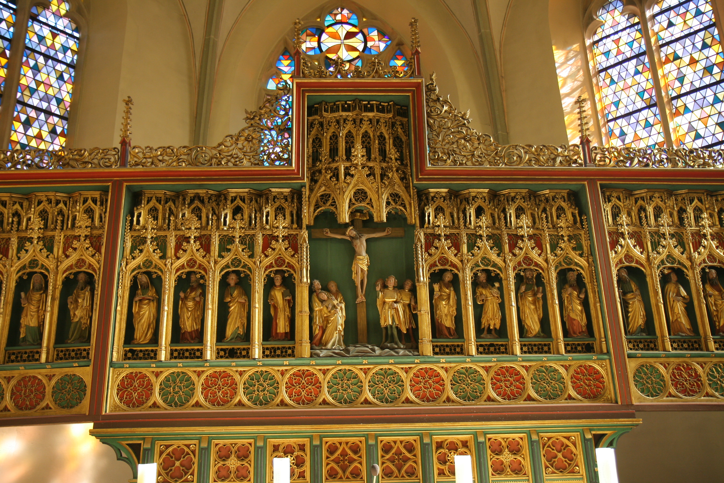 Altar mit spätgotischem Klappaltaraufsatz in der Obersten Stadtkirche in Iserlohn.